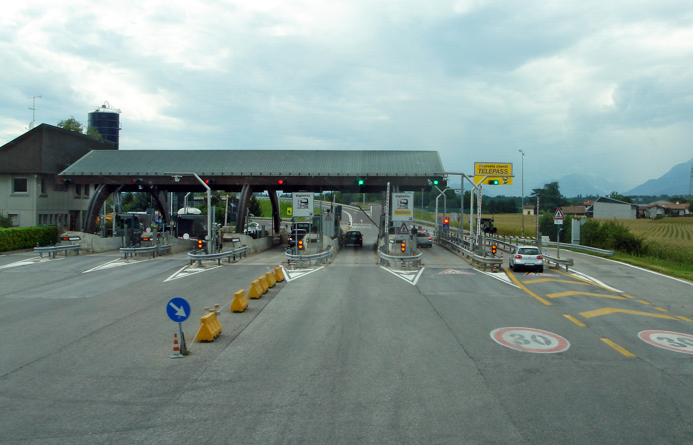 Mautstation Udine Nord